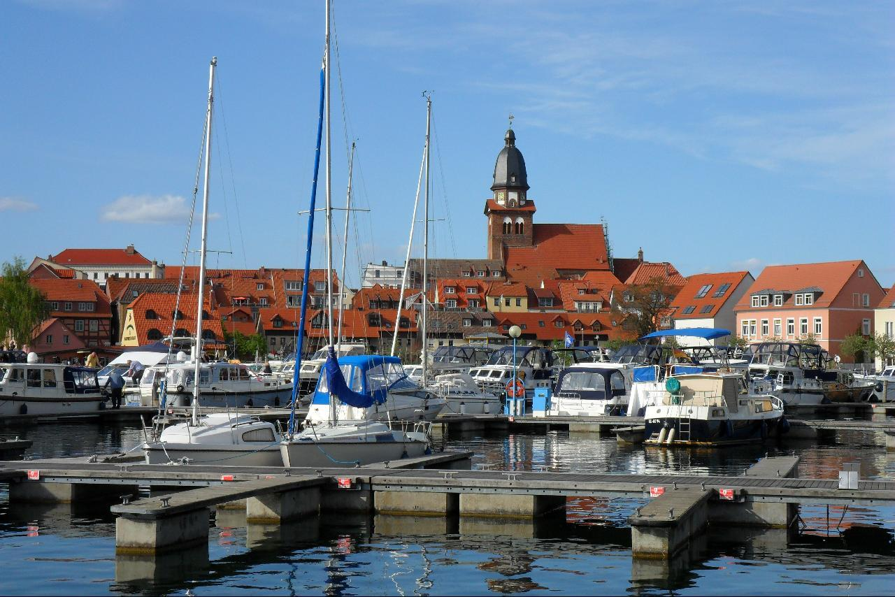 Steganlage